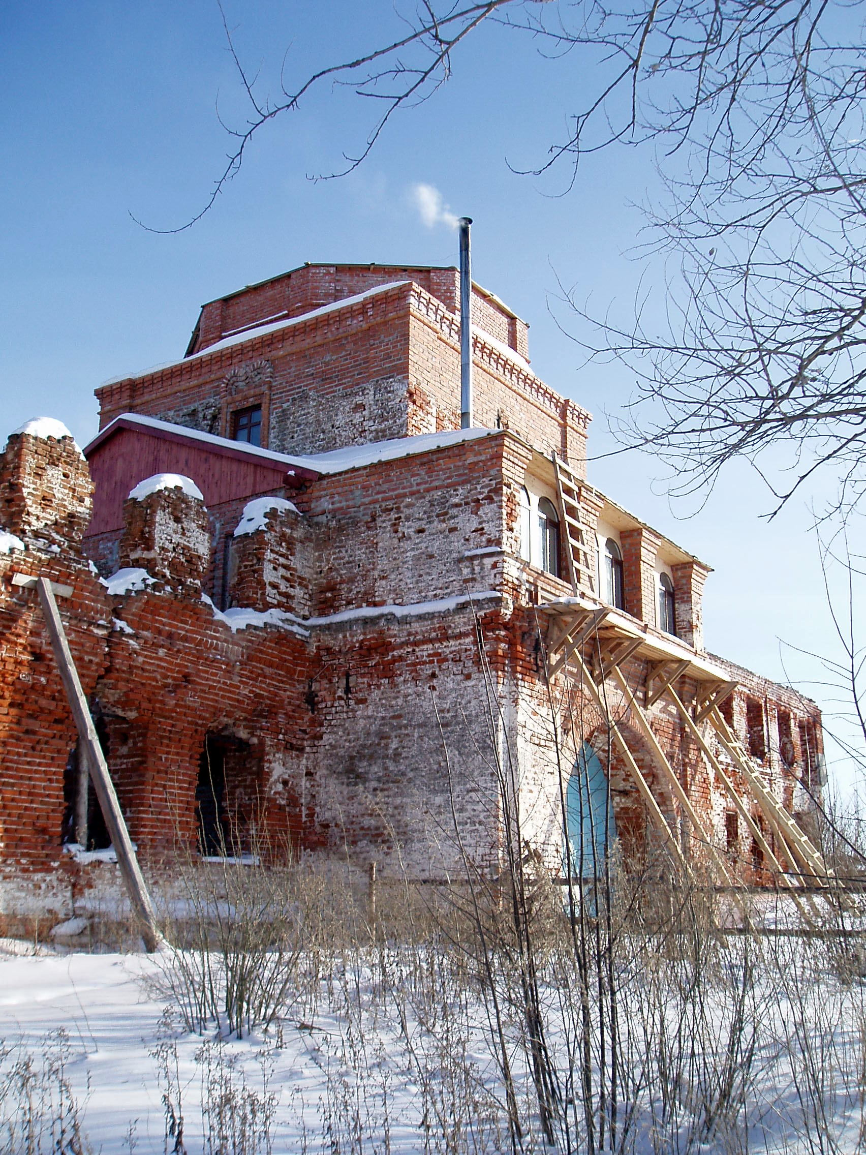 Надвратная церковь во имя Преподобного Михаила Малеина